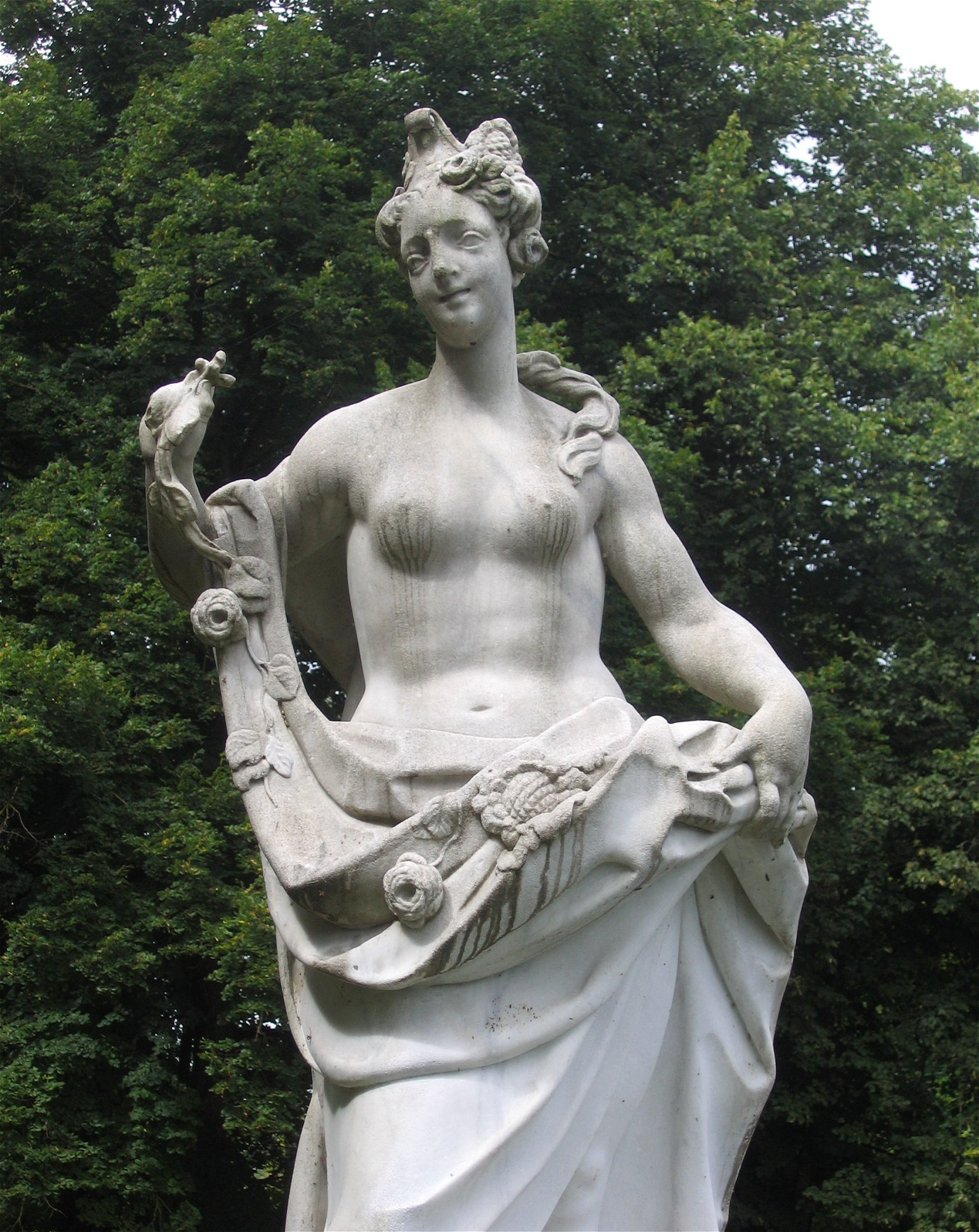 Statue der Flora von Giuseppe Volpini (um 1728), im Schlosspark Nymphenburg, Muenchen